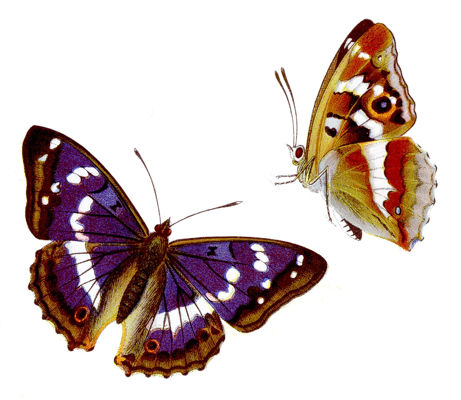 Großer Schillerfalter - Apatura iris